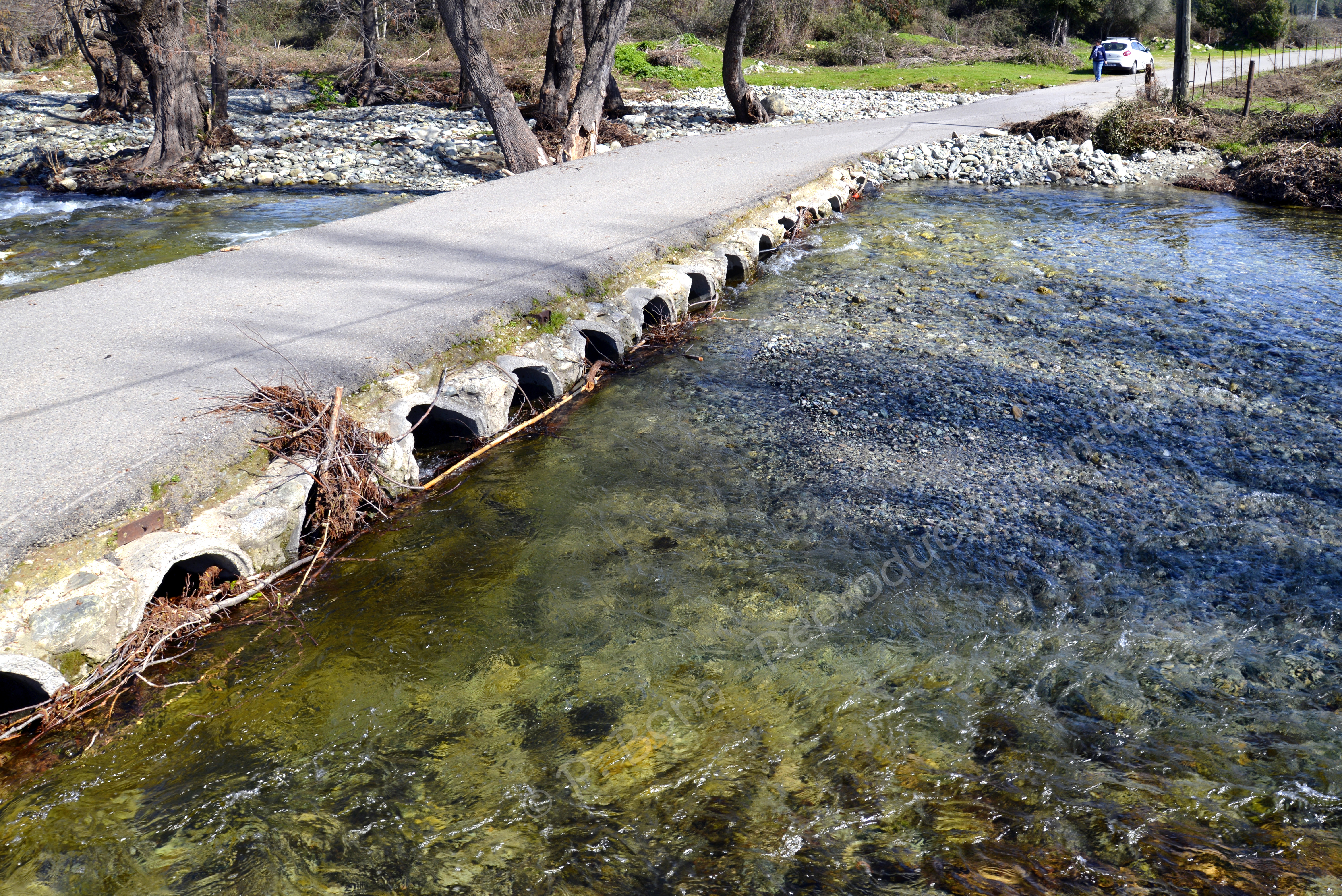 Piève, Nebbio (Corse) - Pont (ou gué) de Ghjuncaja sur la rivière Aliso, chemin de Santo-Pietro-di-Tenda à Saint-Florent